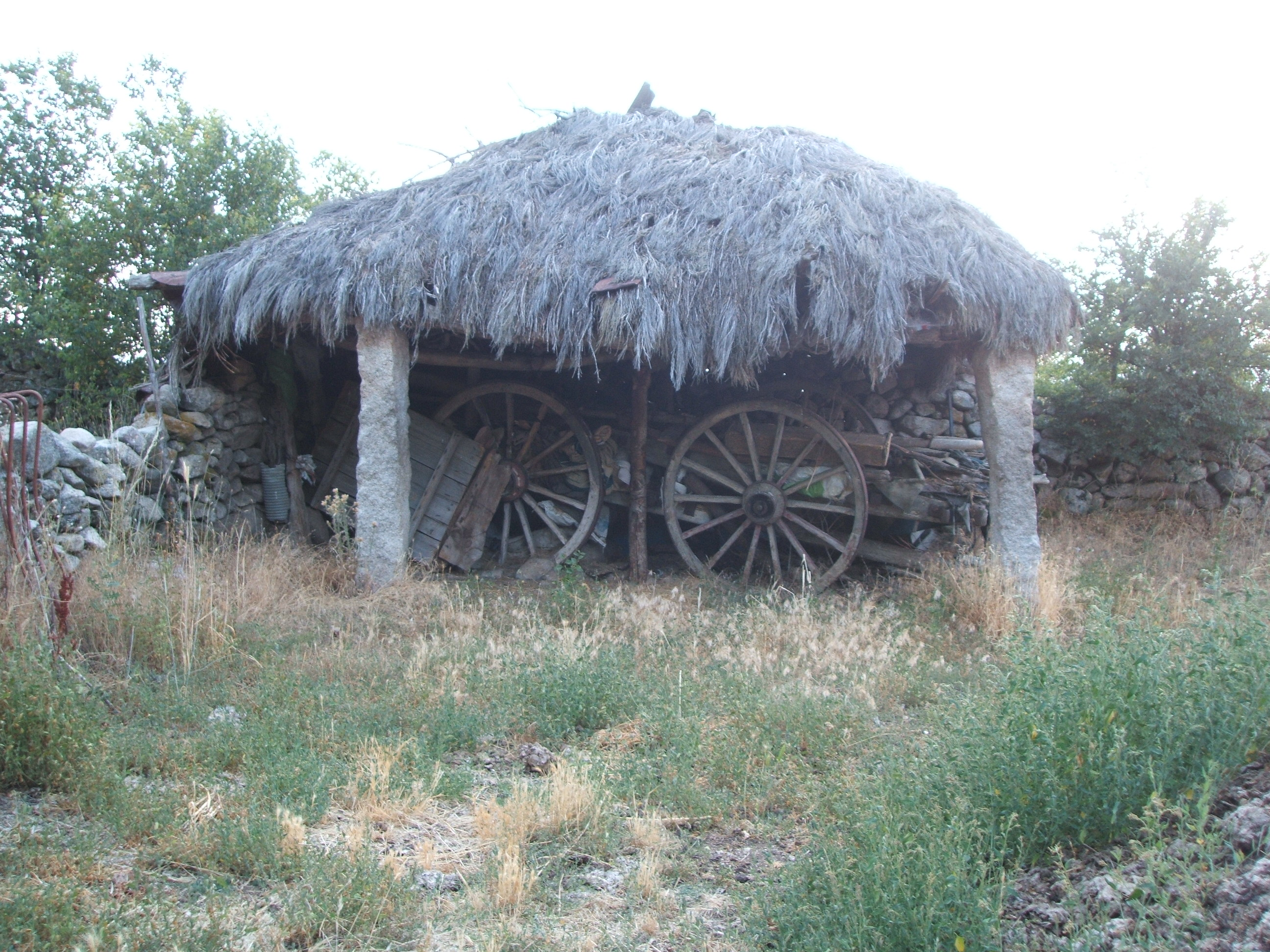 Carros en Chozo (raíces vetonas) en Garganta del Villar (Ávila, España). AUTOR: Alfredo (con permiso del autor)